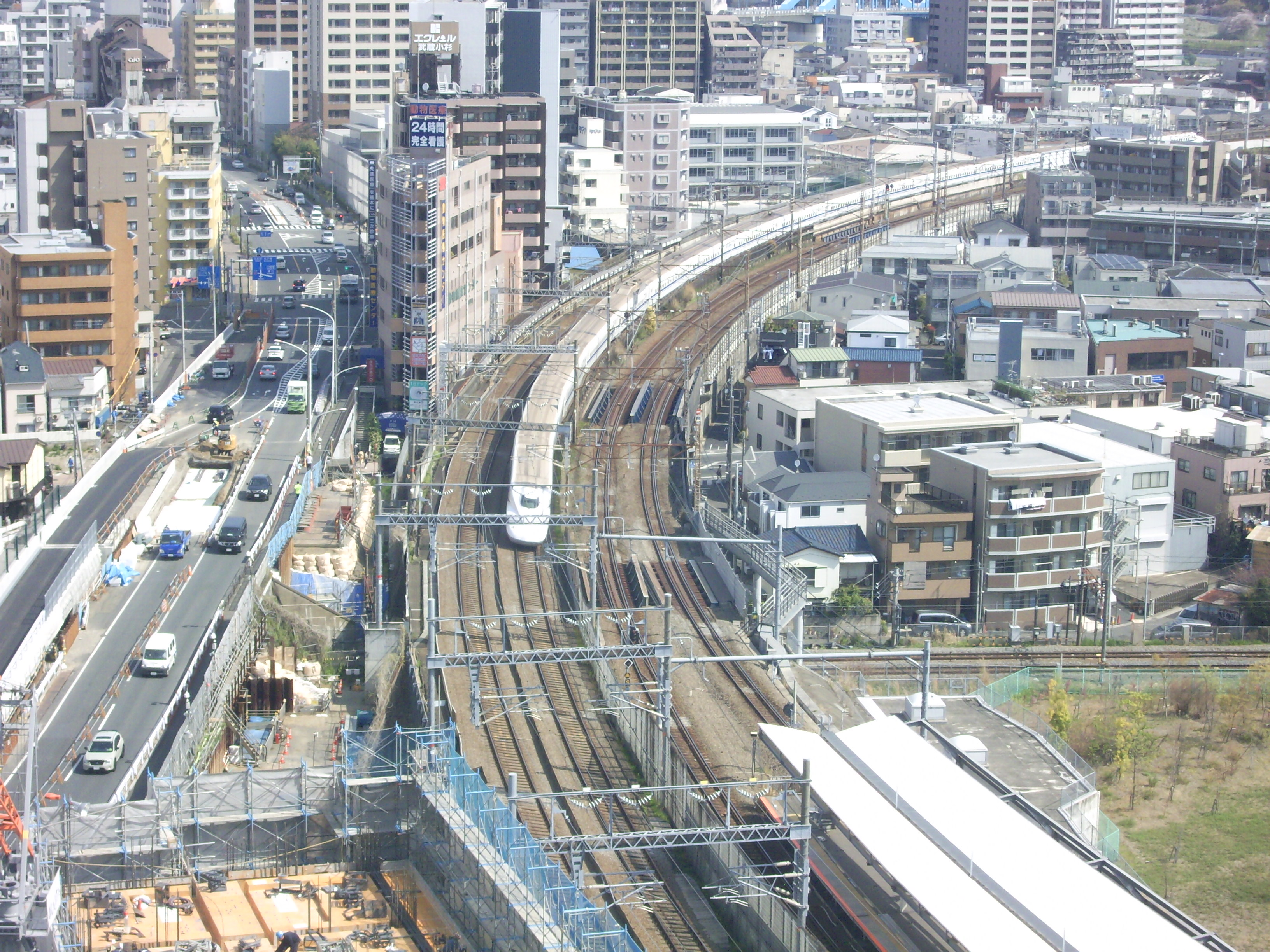 東海道新幹線の中で最も急カーブ（最小曲線半径約500m）の横須賀線武蔵小杉駅手前：宿泊した武蔵小杉駅前ホテルの窓から撮影 ㊟カメラを起動すると日付機能が出荷時のものに初期化されるため、ファイル履歴の撮影日時とメタデータの原画像データの生成日時が異なります